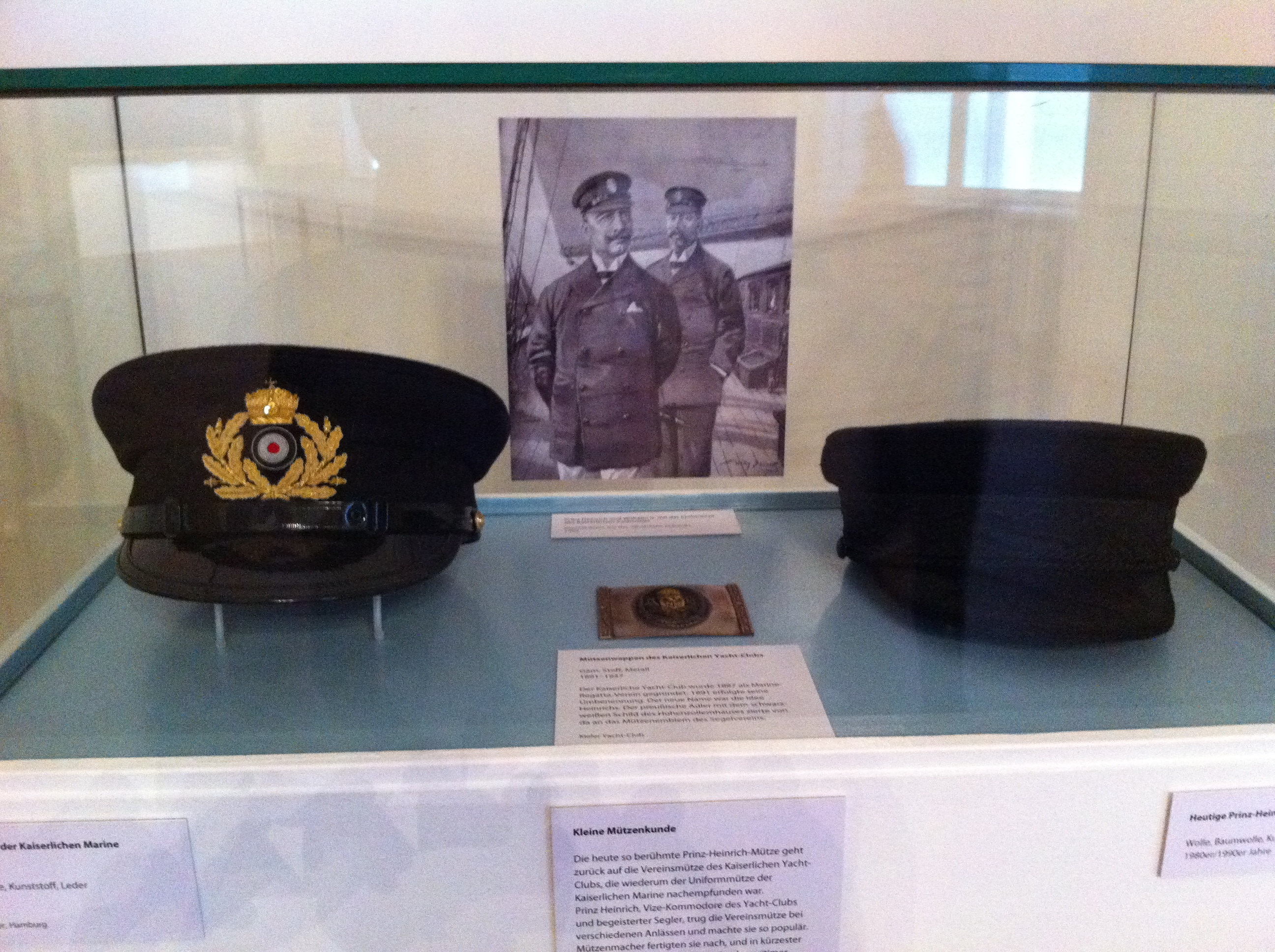 originale Prinz Heinrich Mütze (Stadtmuseum Kiel)